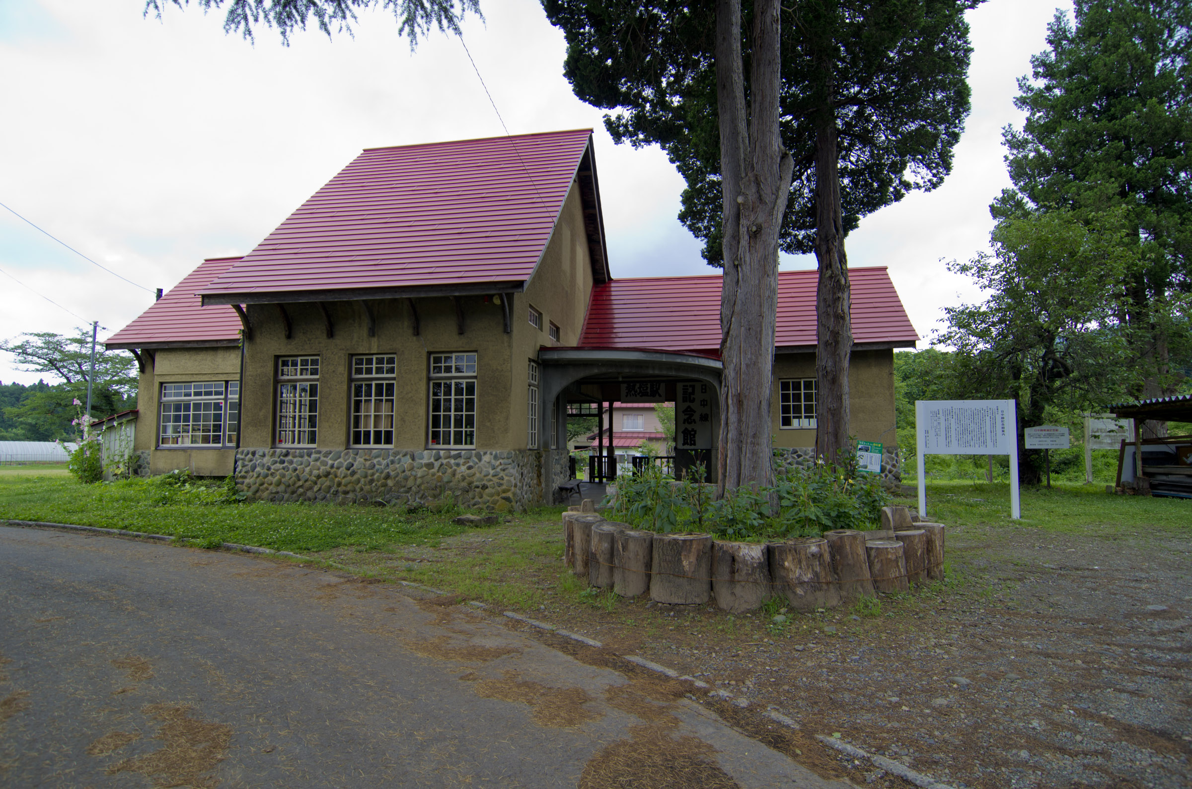 国鉄日中線熱塩駅（日中線記念館）。